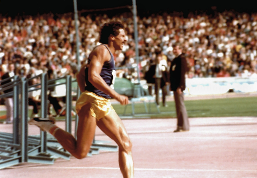 Harald Schmid beim Internationalen Leichtathletik-Sportfest in Köln, 1981